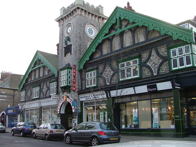 Carlton cinema